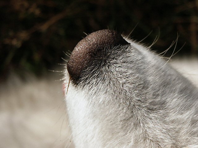 Hundenase eines Samoyeden